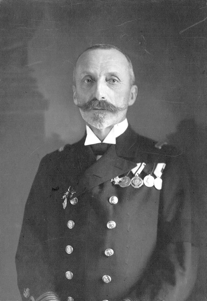 Karol Stefan Habsburg-Lotaryński (1860-1933).